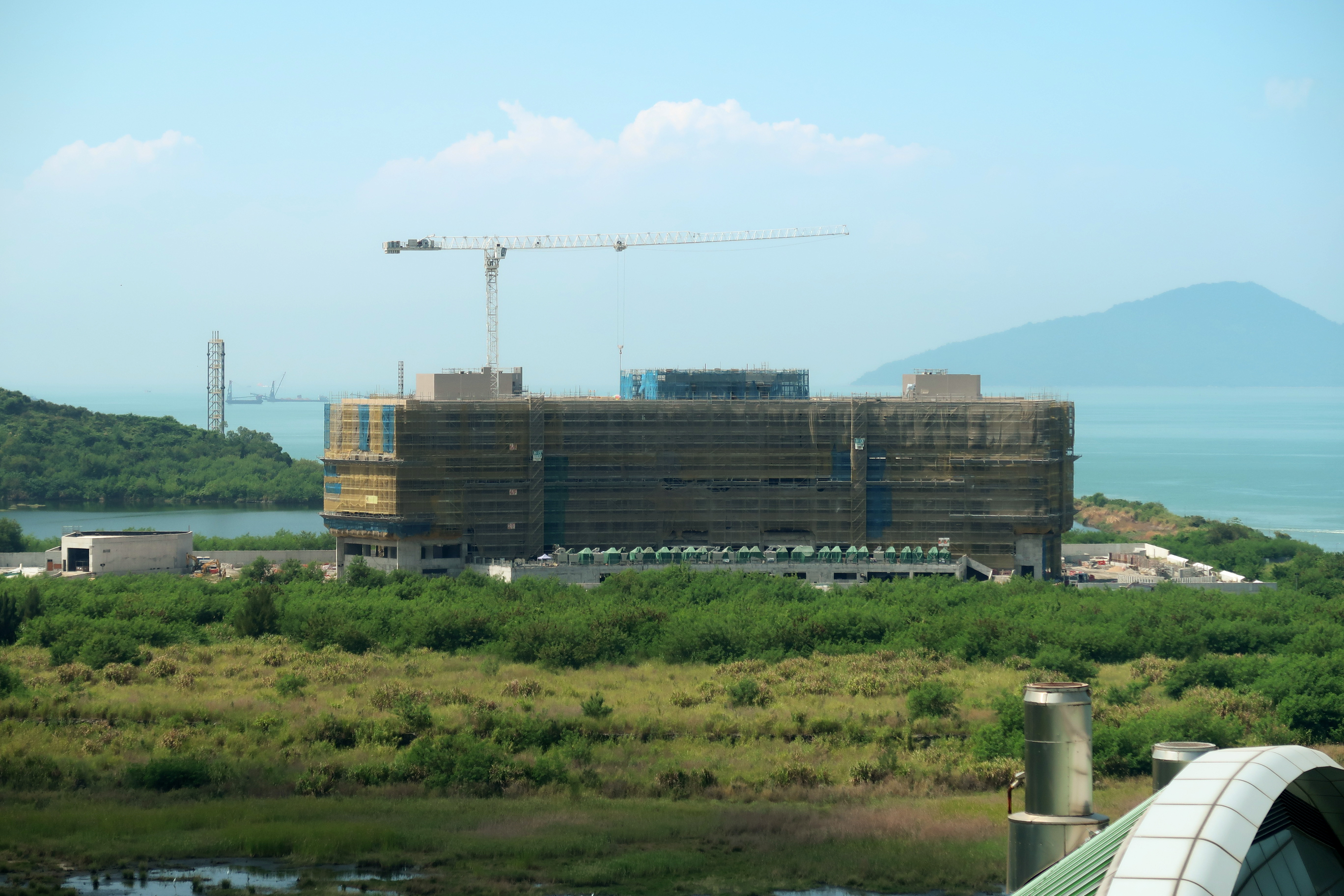 Tsang Tsui Columbarium site